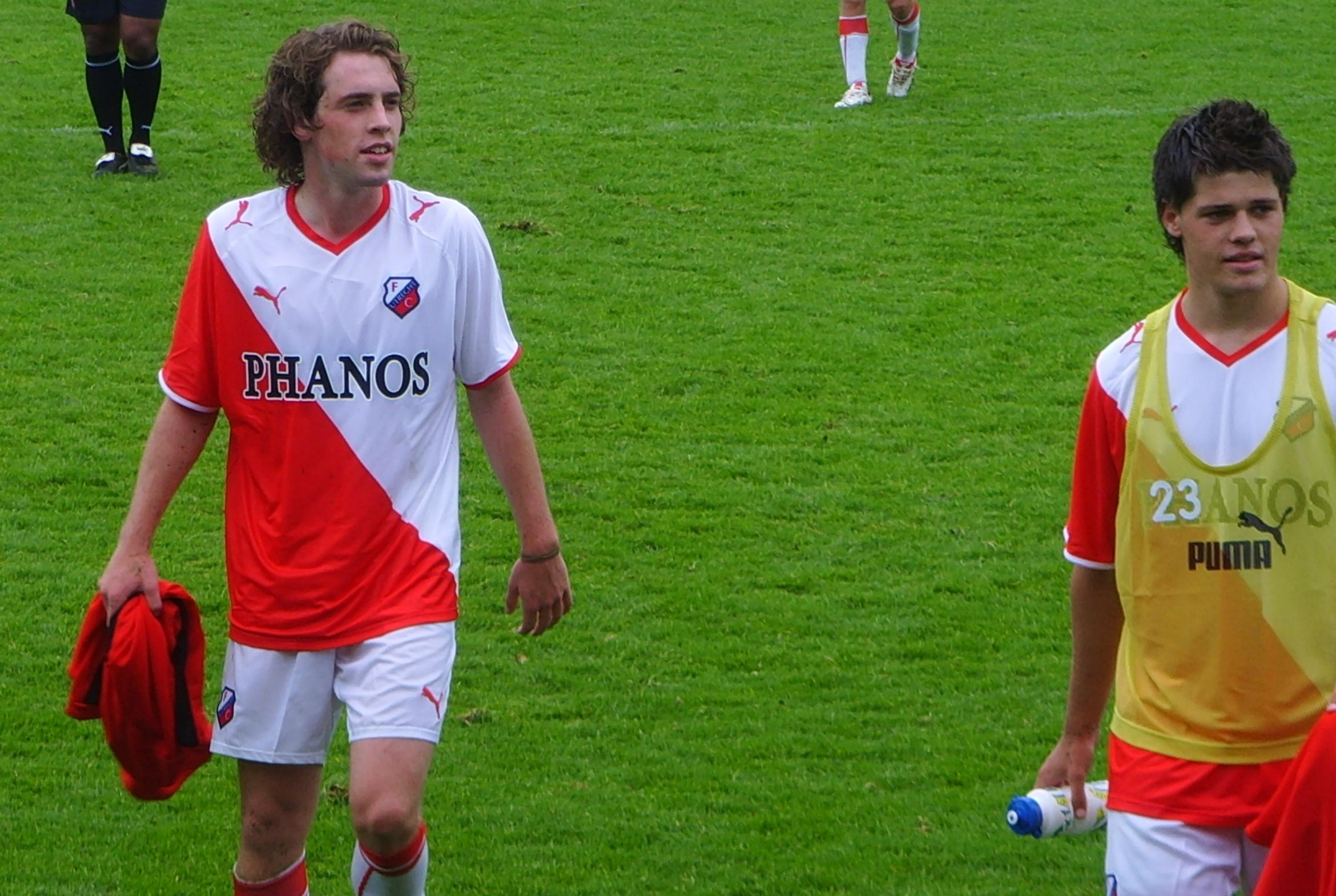 Barry Maguire en Nick Kuipers na de eerste training van het seizoen 2008-2009 van FC Utrecht